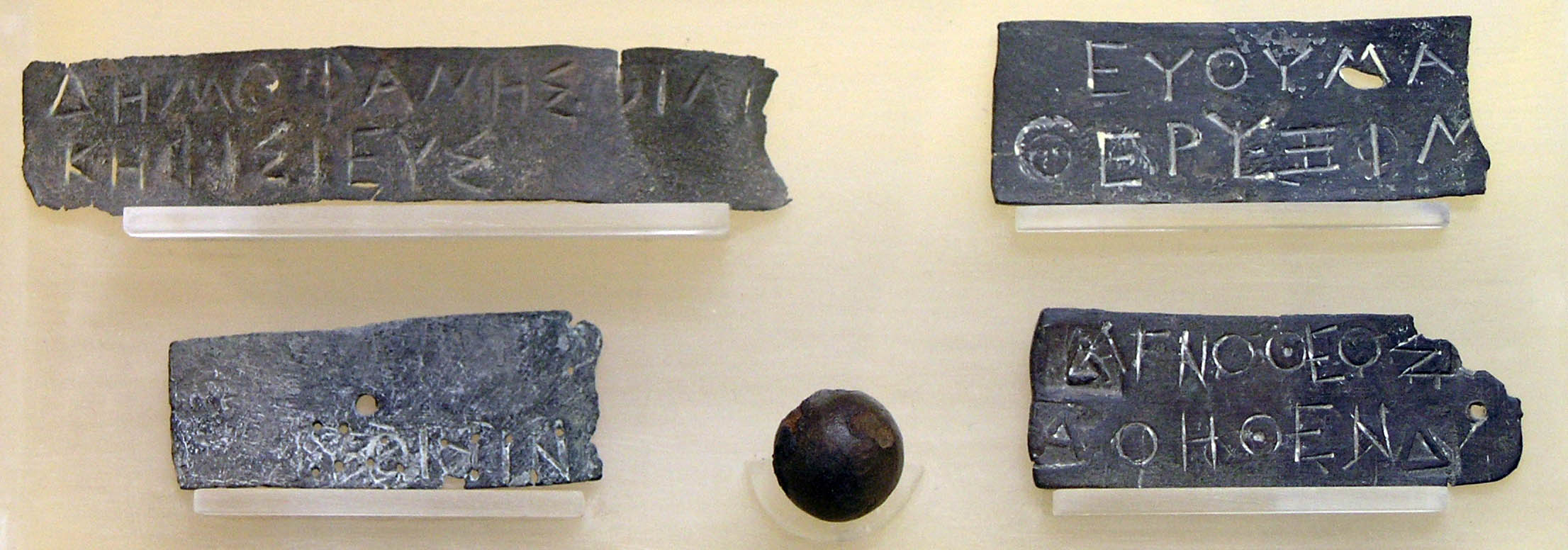 Pinakia, tabletas de identificación de los ciudadanos (nombre, nombre del padre, demo) para el sorteo de los jurados, siglos V-II a. C. Museo del Ágora antigua de Atenas Pinakia de bronze : plaquette attribuée à chaque citoyen éligible pour servir dans un jury populaire, sur laquelle étaient gravés son nom, celui de son père et celui de son dème. Ve-IIe s. a. C. Musée de l'Agora antique d'Athènes.